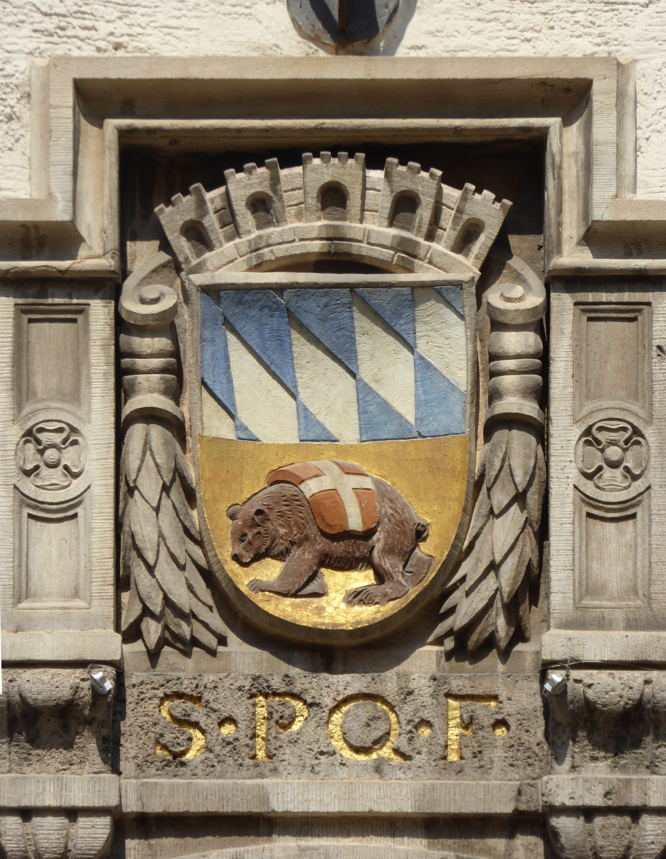 Freising, Wappen am Rathaus.